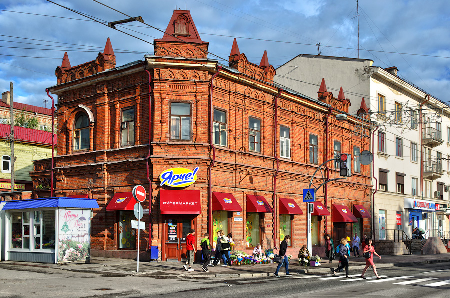 Доходный дом Соболевой А. (Томская область, Томск, Ленина проспект, 89)